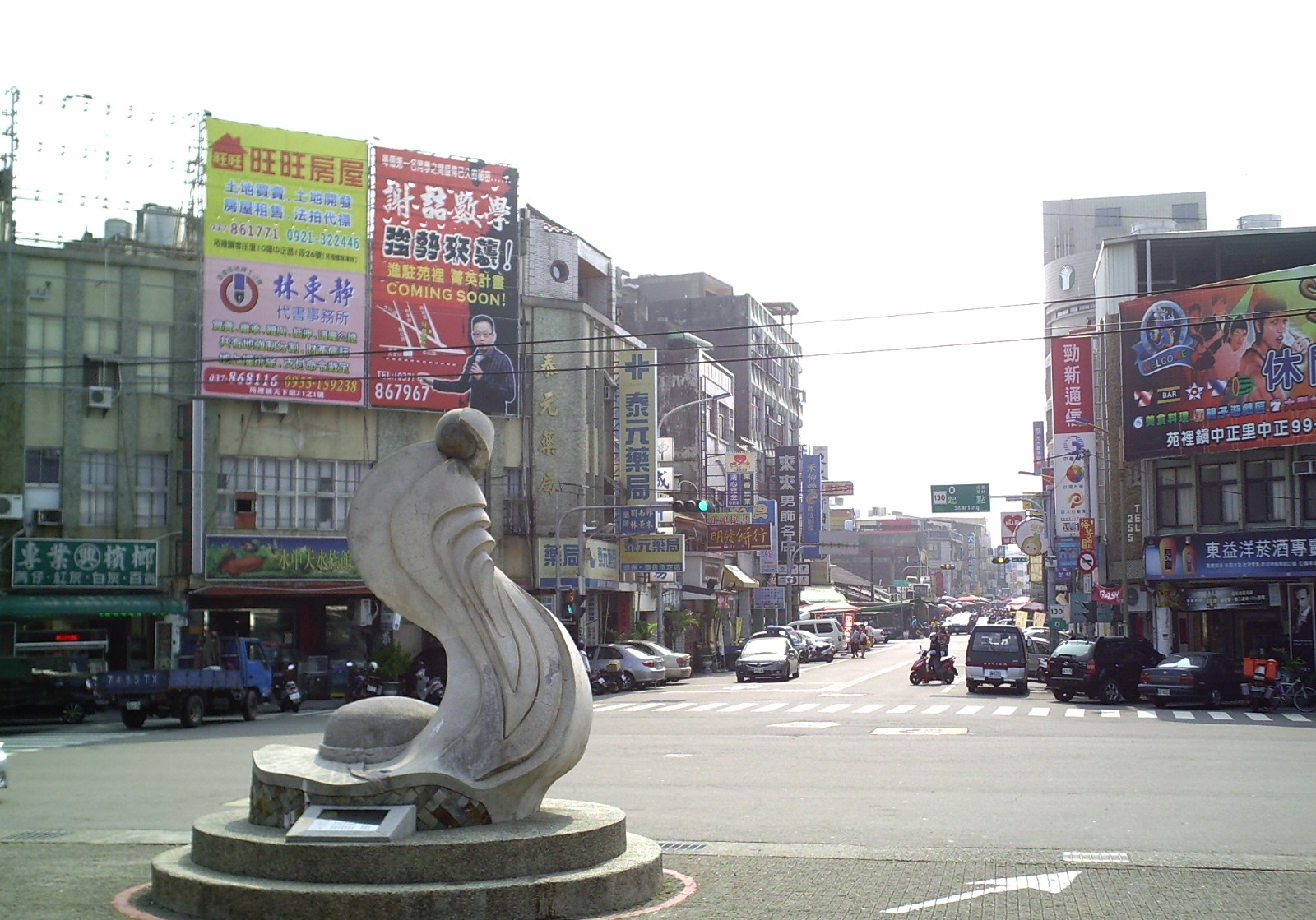 臺灣縣道130號起點，位於苗栗縣苑裡鎮臺鐵苑裡車站前。